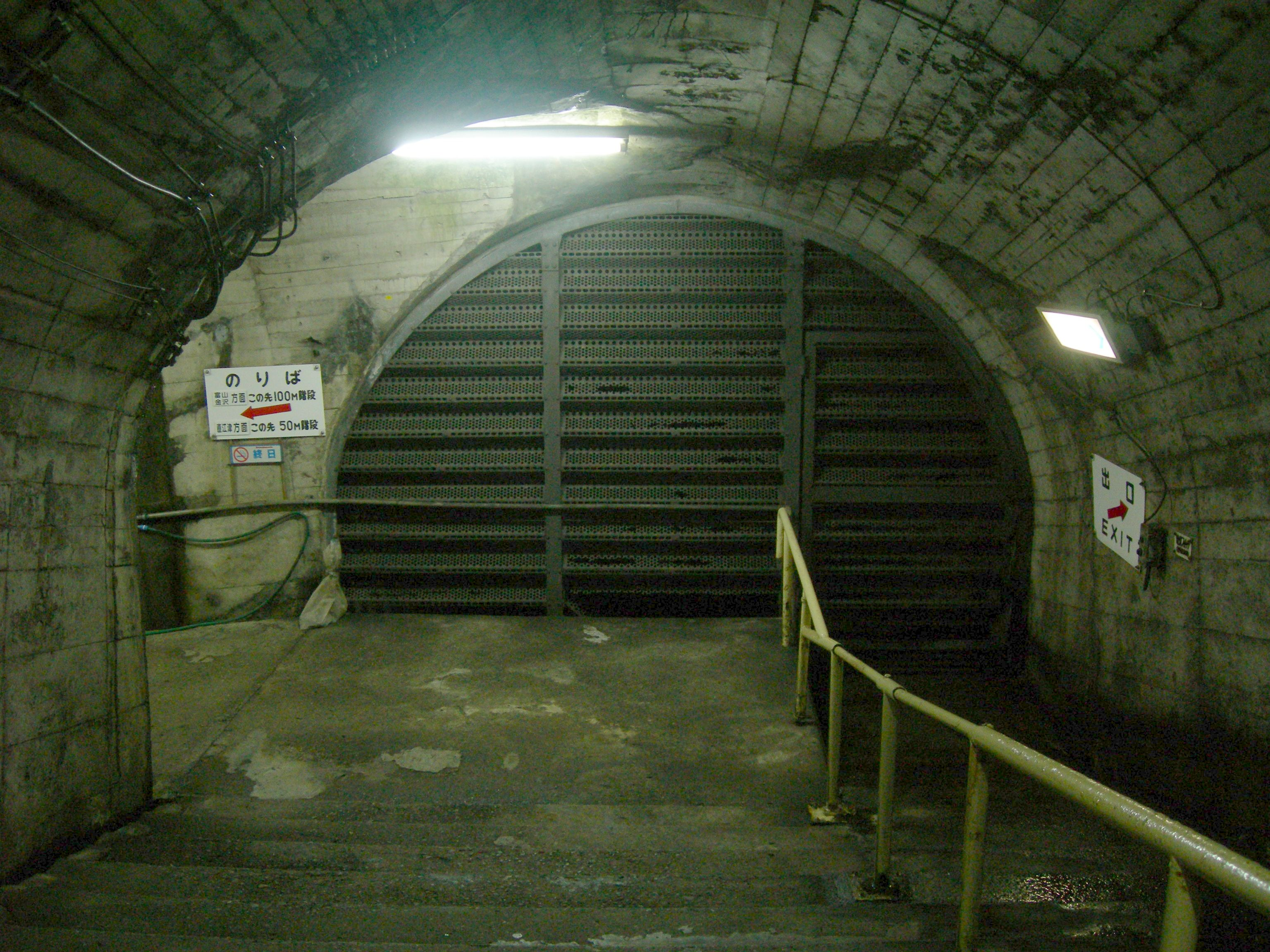 筒石駅の駅舎からホームへ下る階段を224段降りたところにある下り直江津方面ホームの端につながる作業通路、金属製の網で蓋がされており特急列車の通過時は風圧によって非常に強い風が吹き抜ける